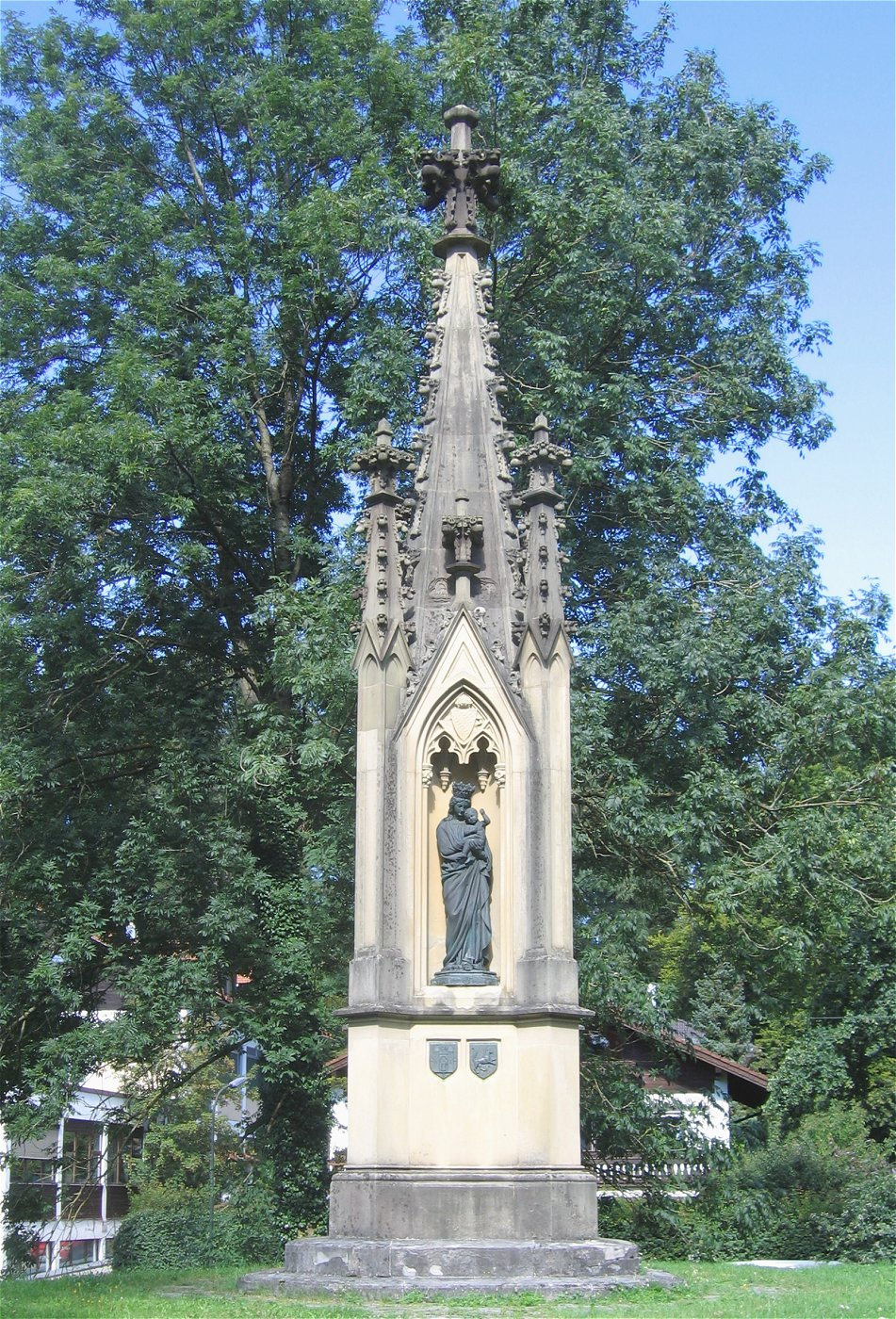 Theresienmonument, Bad Aibling, Denkmal zum Gedächtnis an den schmerzvollen Abschied der Königsmutter Therese von Bayern von ihrem Sohn Otto von Wittelsbach